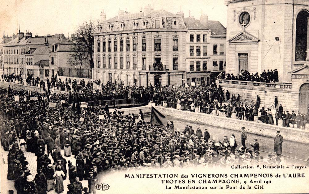 vue de cf. titre.